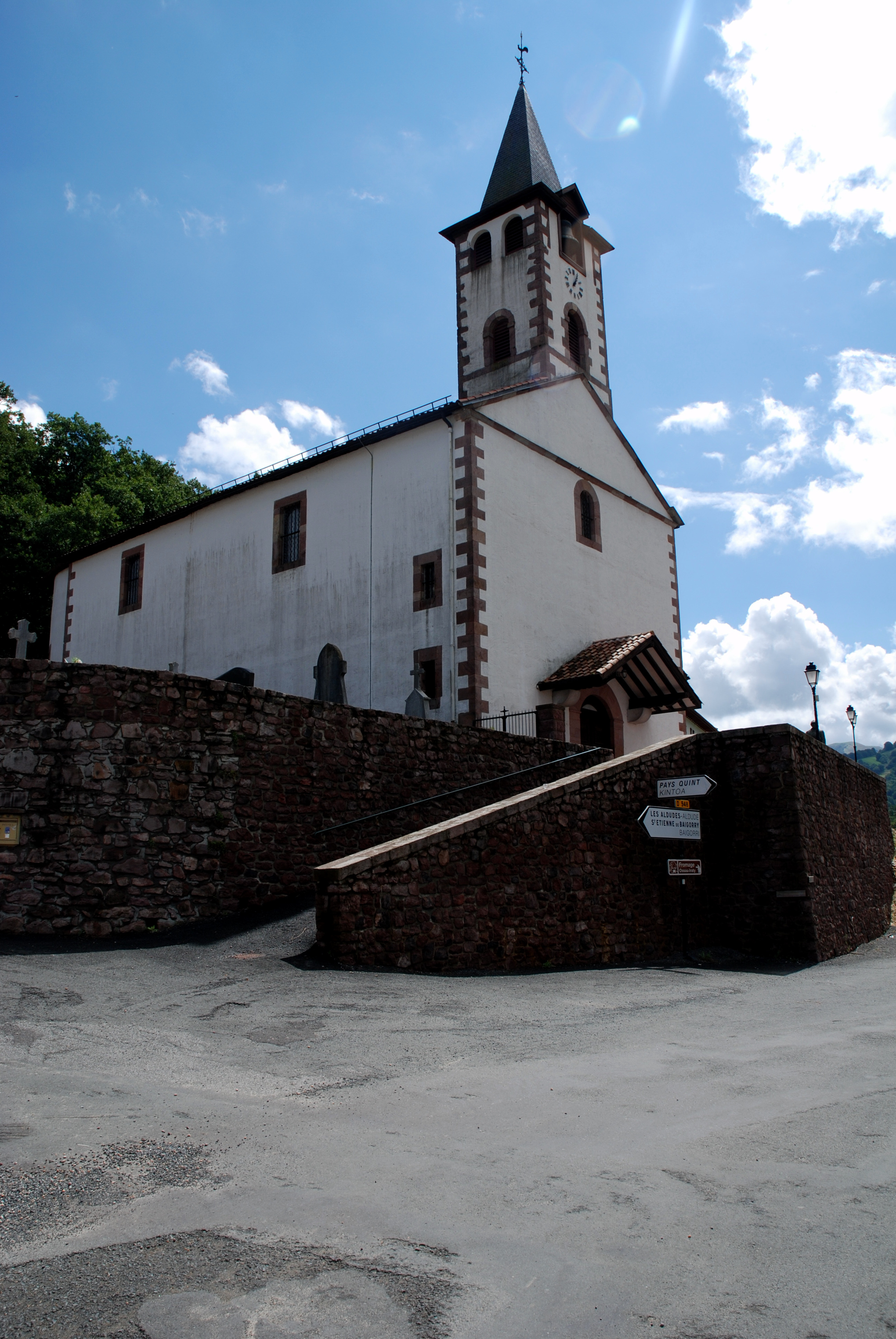 L'église d'Urepel, avec panneau indicateur mentionnant le Pays Quint